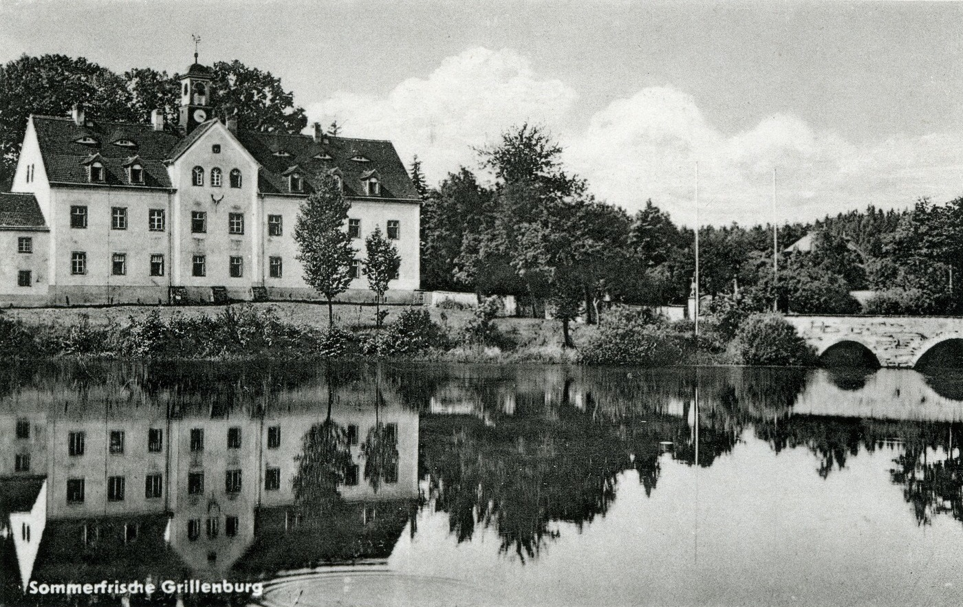 Grillenburg; Jägerhof This postcard is from publisher Brück & Sohn in Meißen ( postcard has a unique number 27031 and is available in a higher resolution at the publisher. This images was uploaded in a cooperation project between Wikipedians and the publisher.